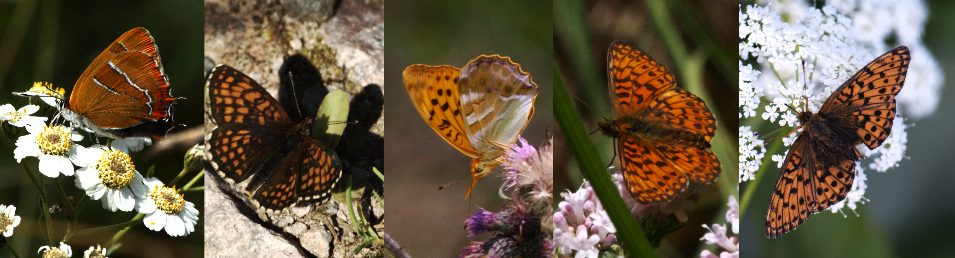 Fünf Tagfalter aus dem Urseetal : Thecla betulae, Melitaea sp., Argynnis paphia, Boloria selene, Branthis ino (verschiedene eigene Fotos in den Jahren 2008 und 2009)